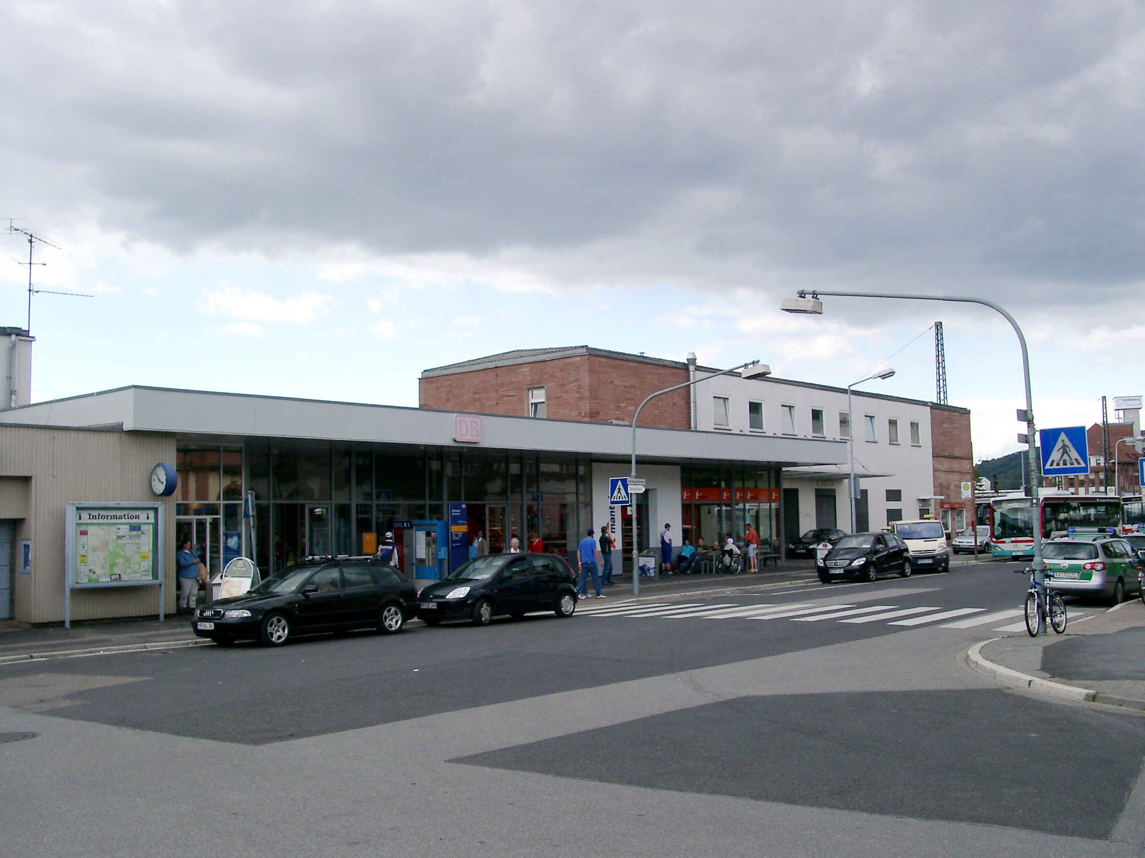 Weinheim an der Bergstraße, Bahnhof